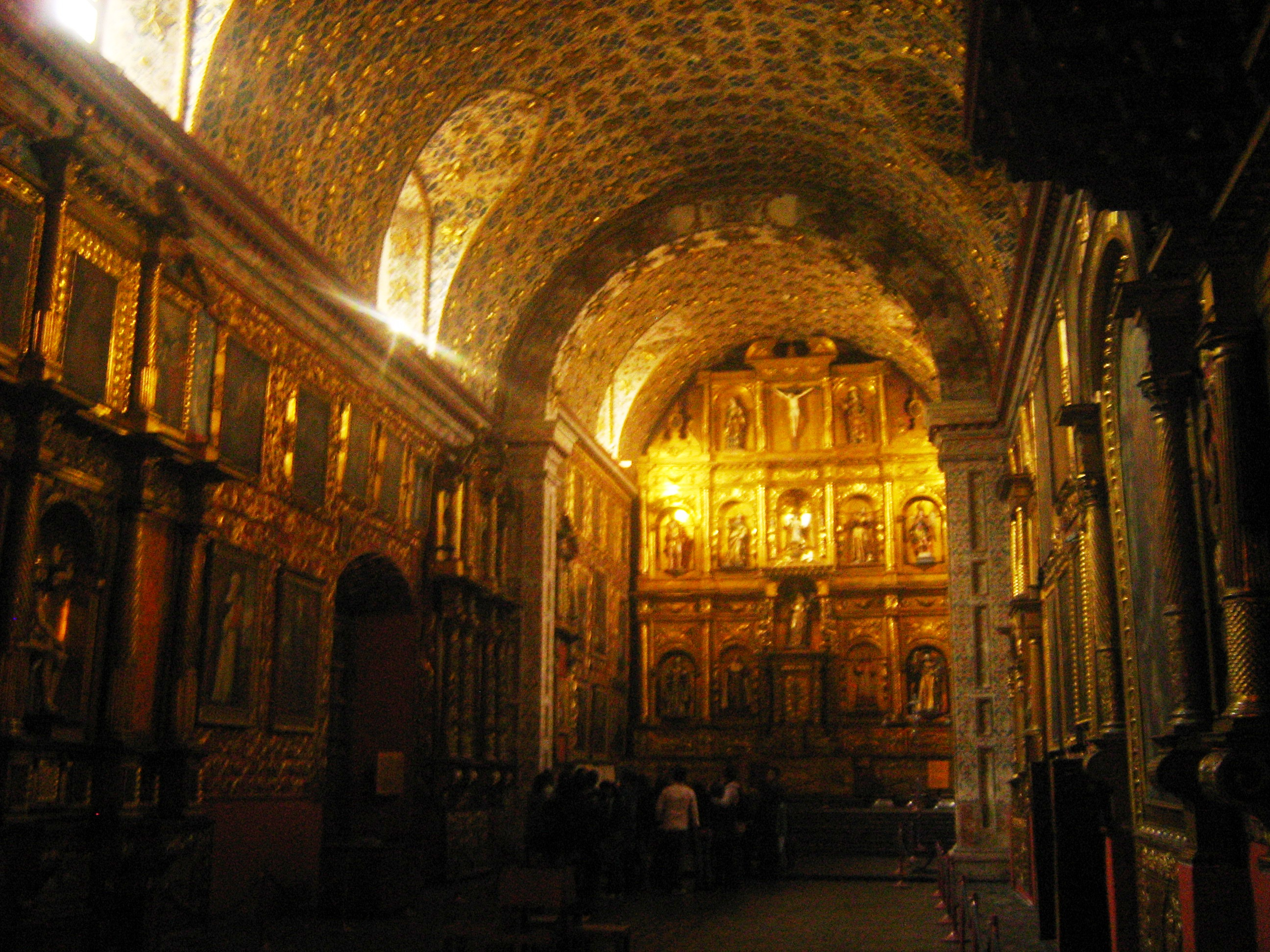 En esta foto se muestra el interio de la Iglesia de Santa Clara ubicada en el barrio la Candelaria, Bogotá, Colombia.